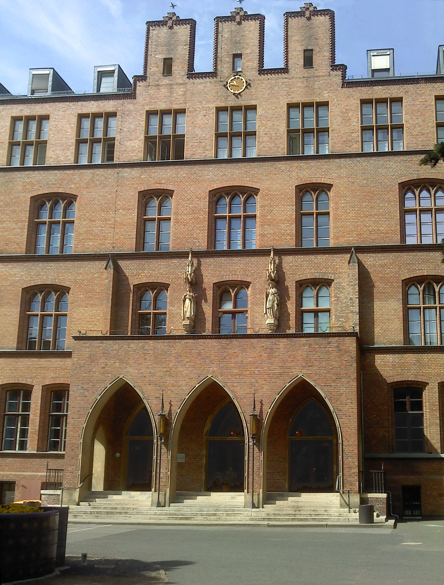 St. Hedwig-Krankenhaus: Haupthaus mit Vorhalle; am linken unteren Bildrand ist der Agathabrunnen zu sehen.